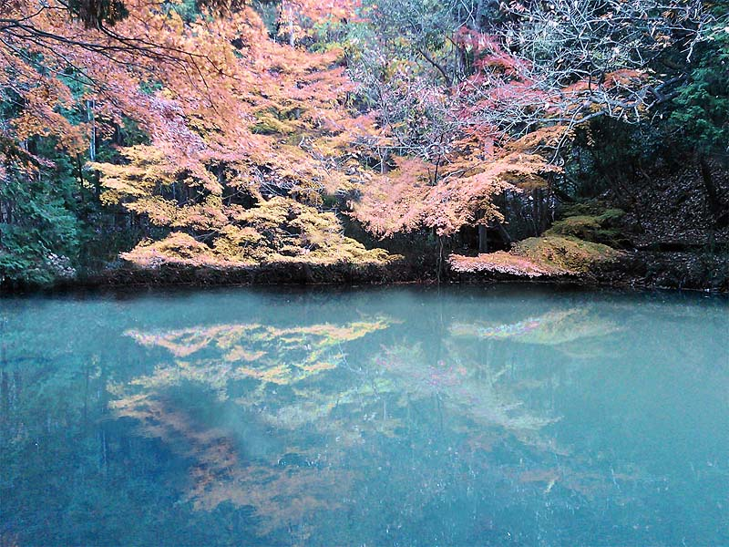 京都 鷹峯 太閤山荘 外苑 紅葉谷庭園 （秋の紅葉）